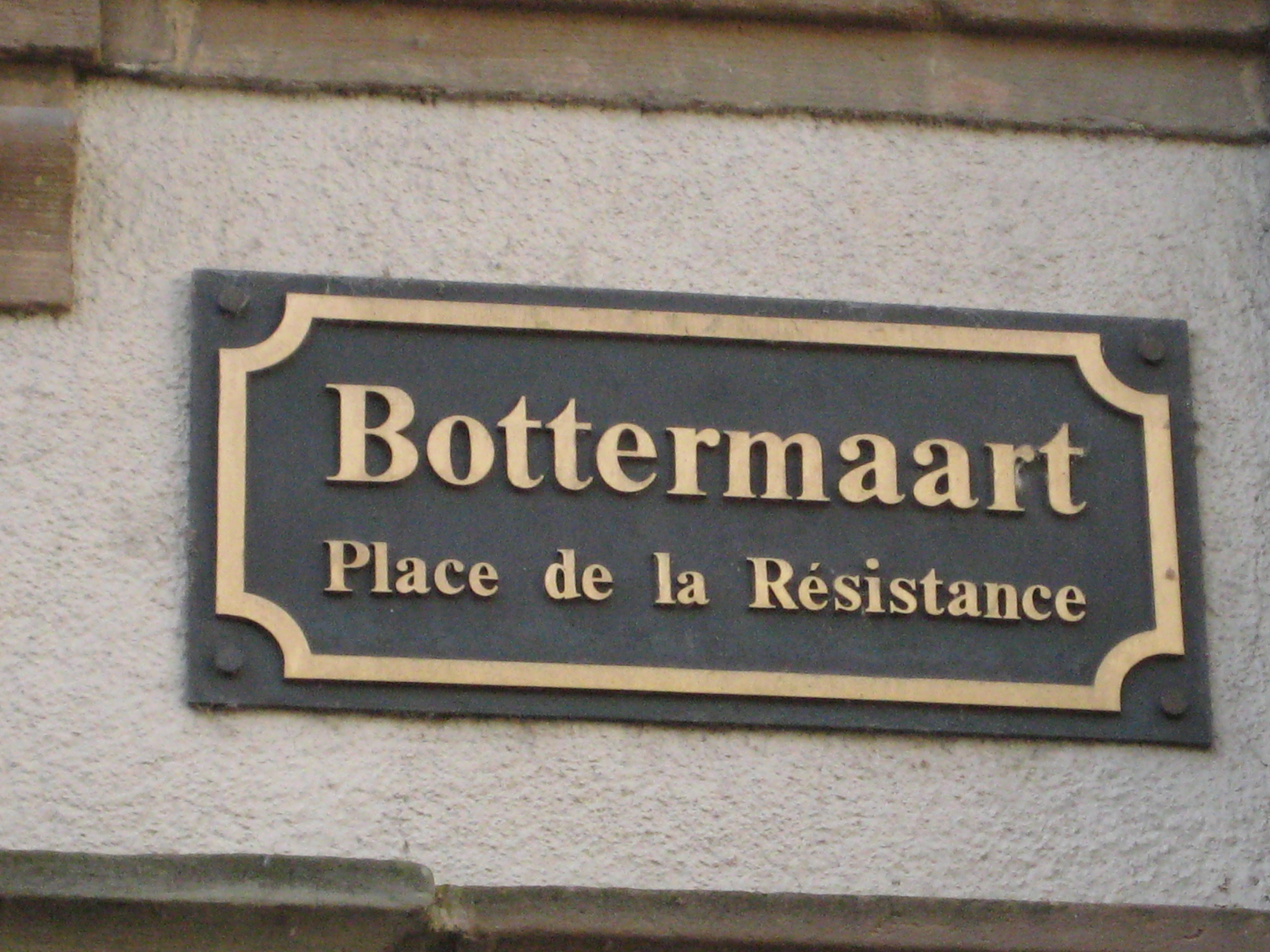 Bottermaartschëld zu Ettelbréck.